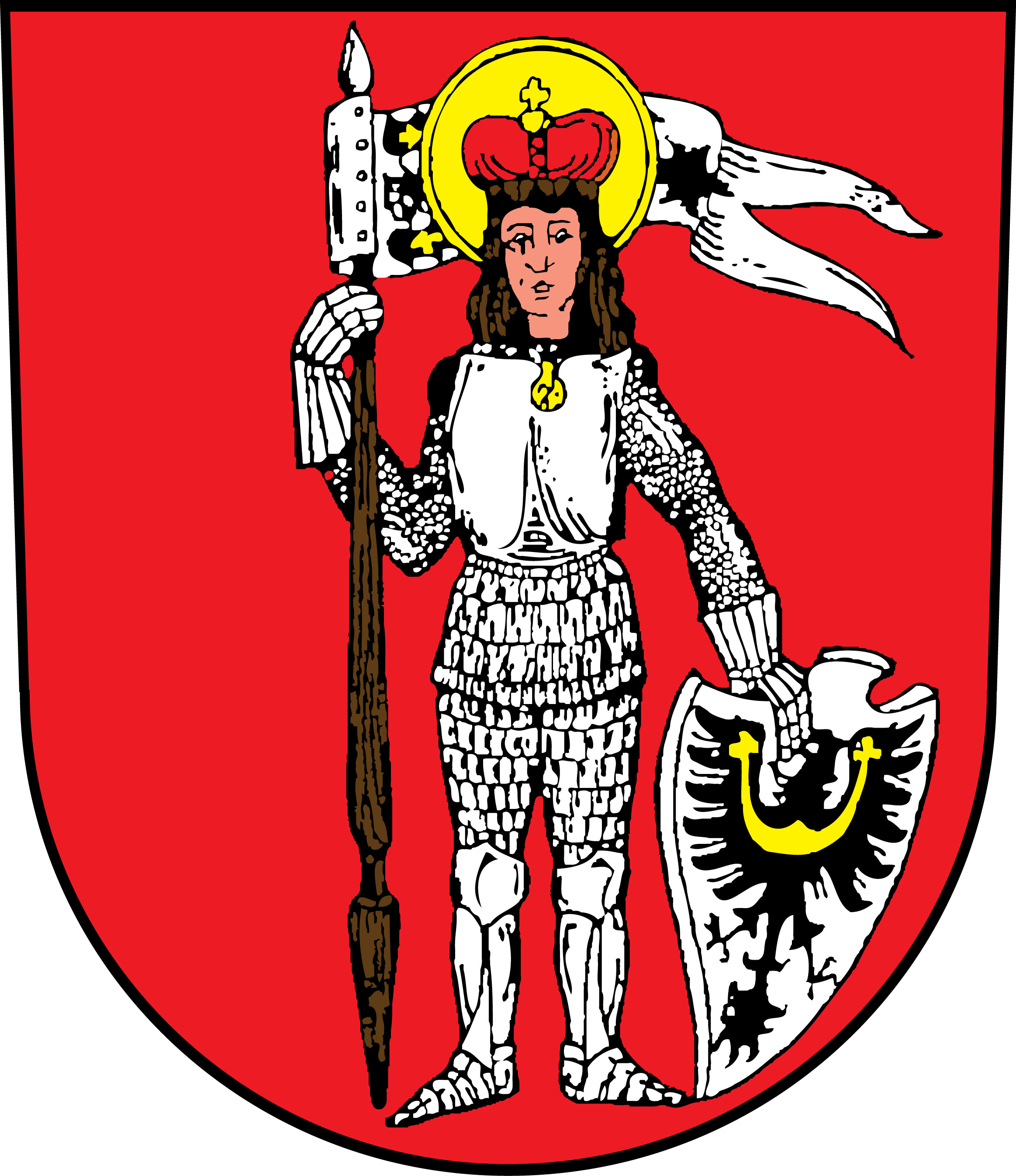 Znak města Trhový Štěpánov